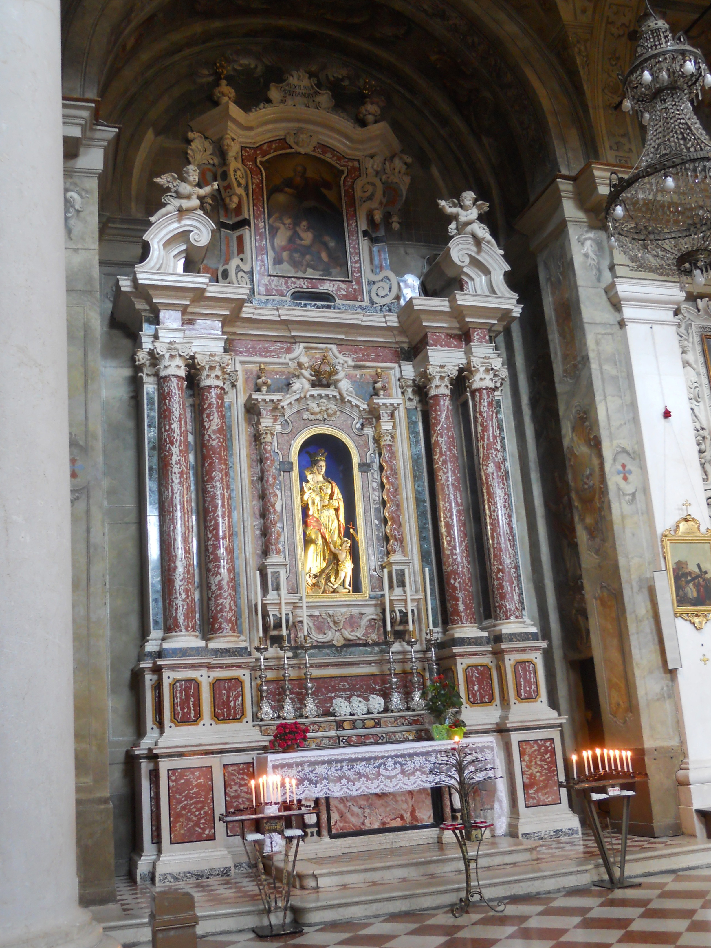 San Faustino maggiore (Brescia) (altare madonna)